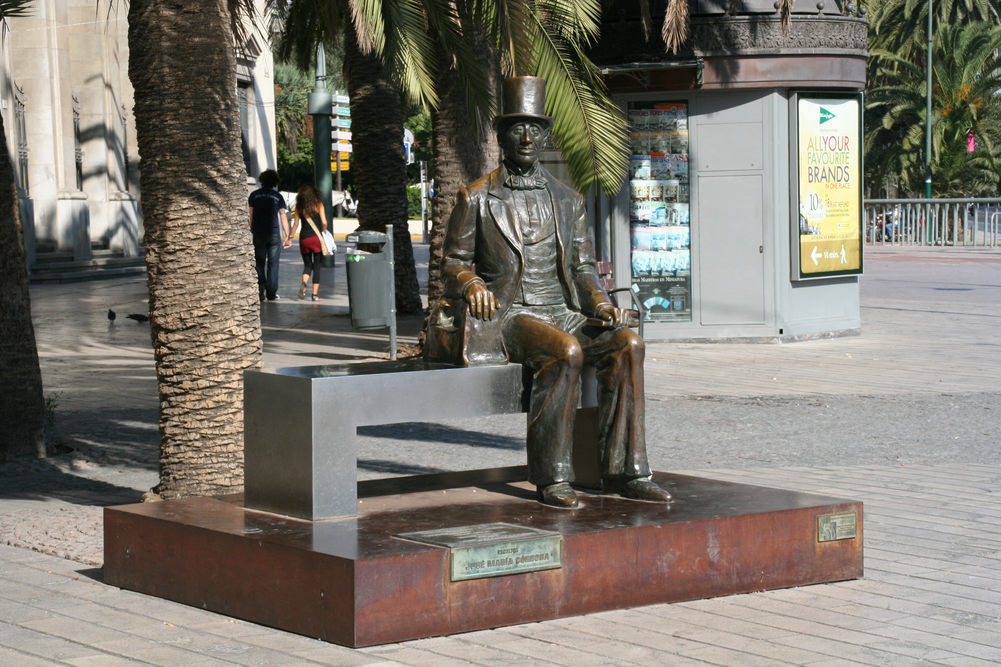 Escultura de Hans Christian Andersen en el Paseo del Parque en Málaga